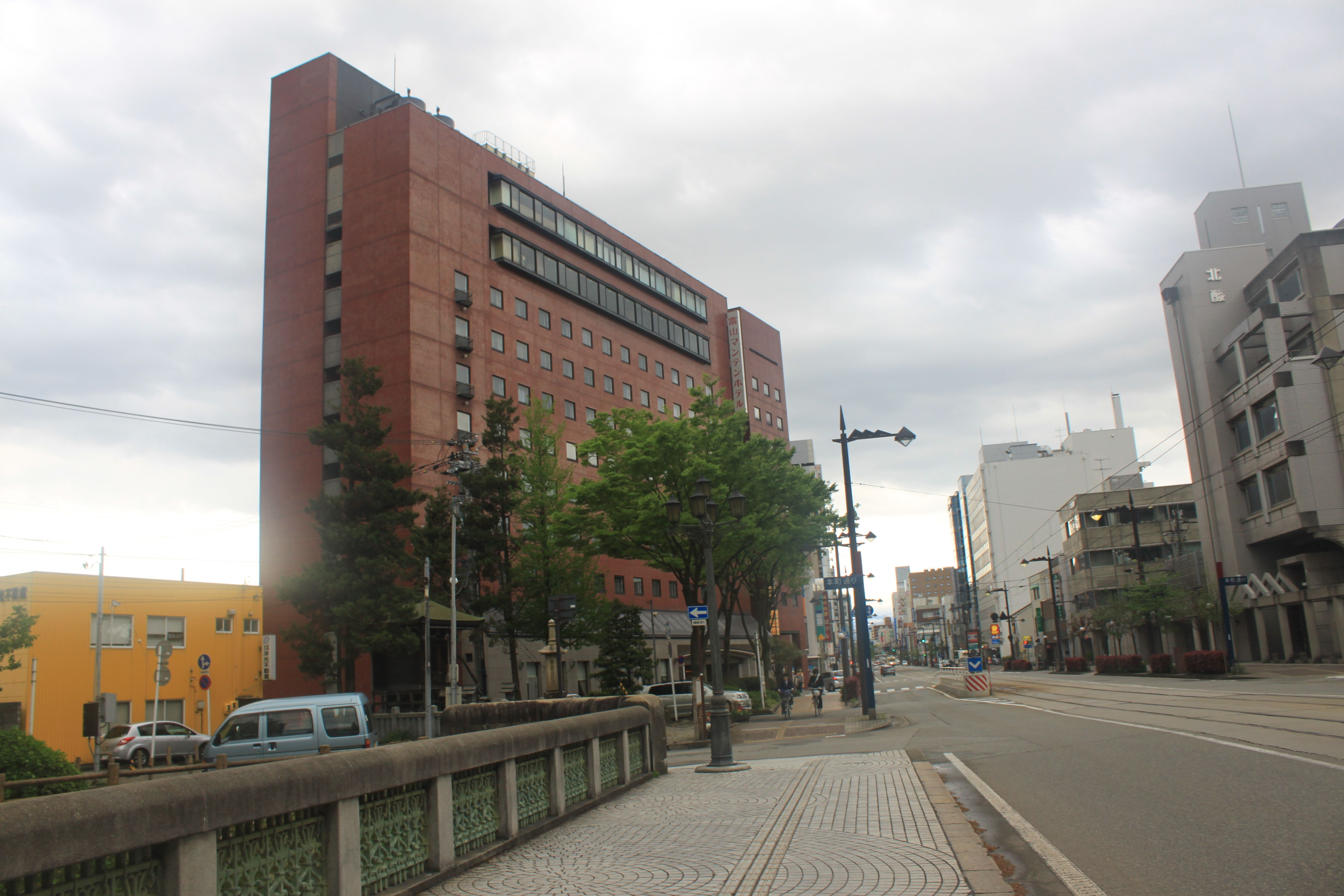 富山マンテンホテル